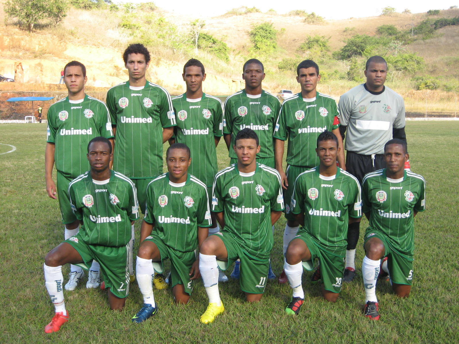 Atletas profissionais do Três Rios em 2010.